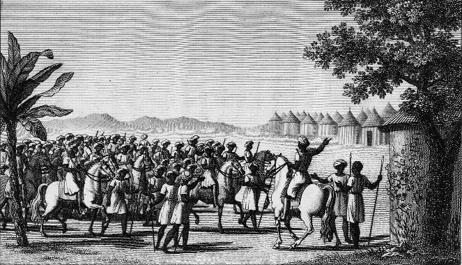 "Vue de l’armée du Fouta Toro en marche" [Illustrations de Voyage dans l'intérieur de l'Afrique aux sources du Sénégal et de la Gambie, fait en 1818 par ordre du gouvernement français, G. Mollien